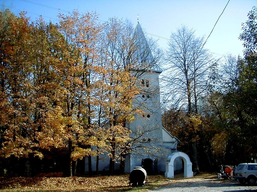 Lielvircavas baznīca 2000-10-06